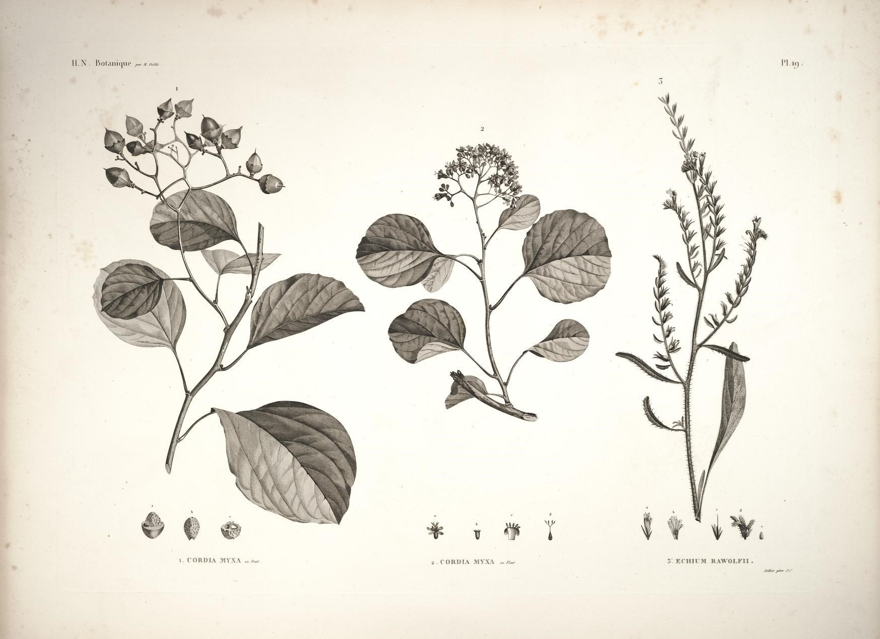 H.N. Botanique par M. Delile Pl. 191. Cordia myxa (+ fruit) 2. Cordia myxa ( + fleur) 3. Echium rawolfii (= Echium rauwolfii)